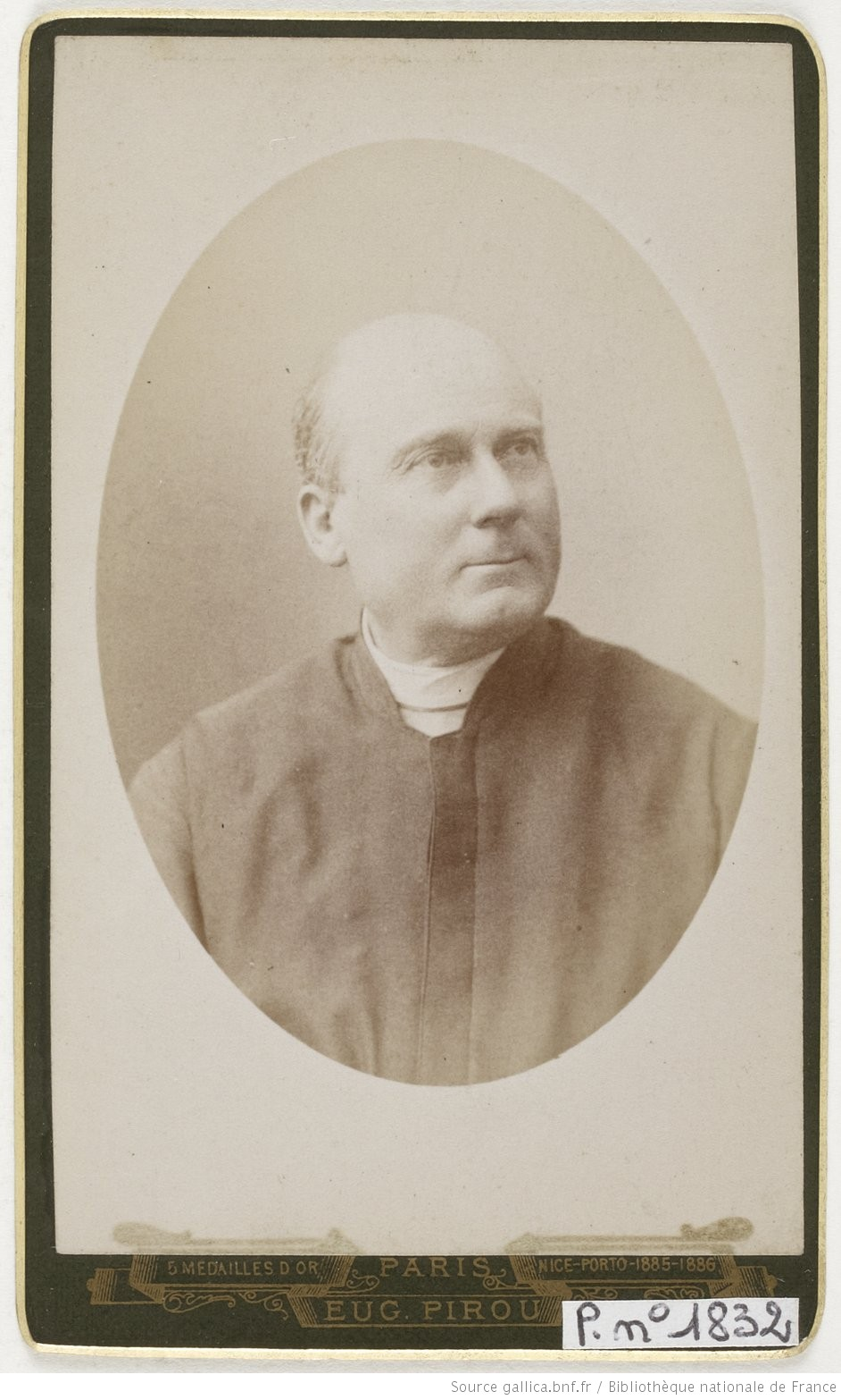 Charles Victor Aubert Duparquet par Pirou Eugène (1841-1909)